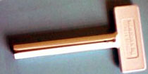 Tubenschluessel